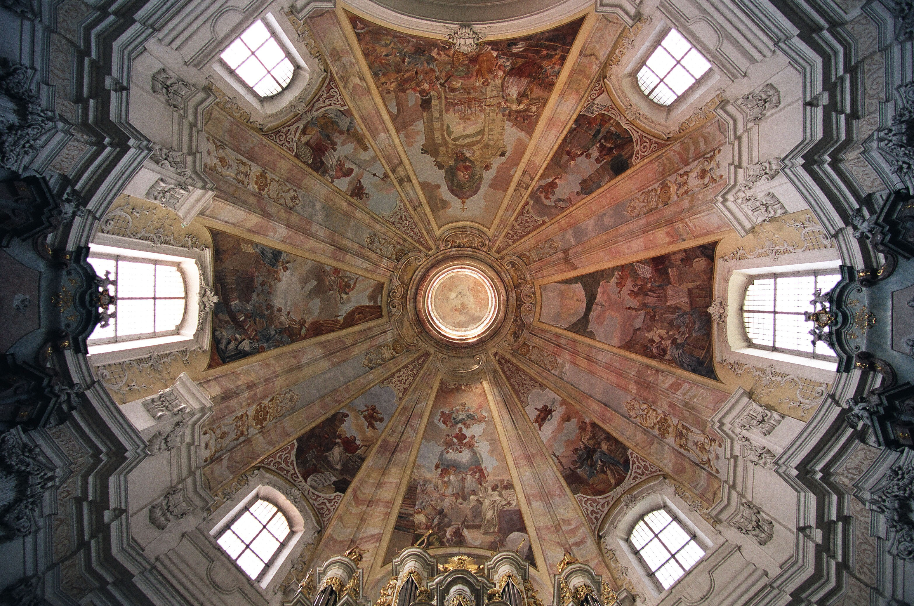 Ląd, kopuła Pompeo Ferrariego z freskami J.W. Neunhertza 1733 r.